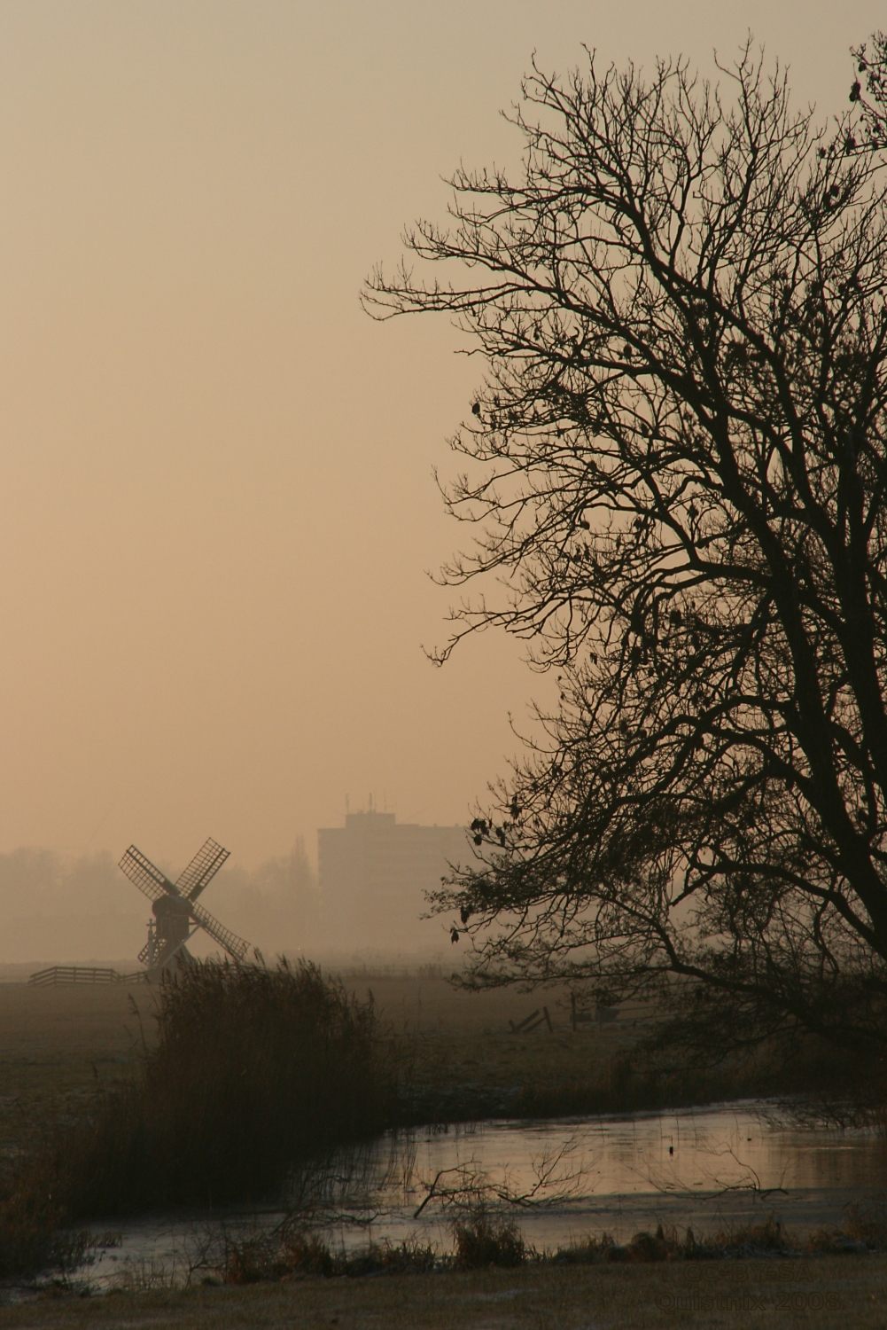 Hartwert: Oegekloostermolen vanuit de verte